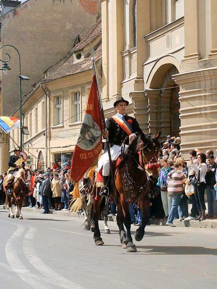 Junii Bătrâni - stegarul